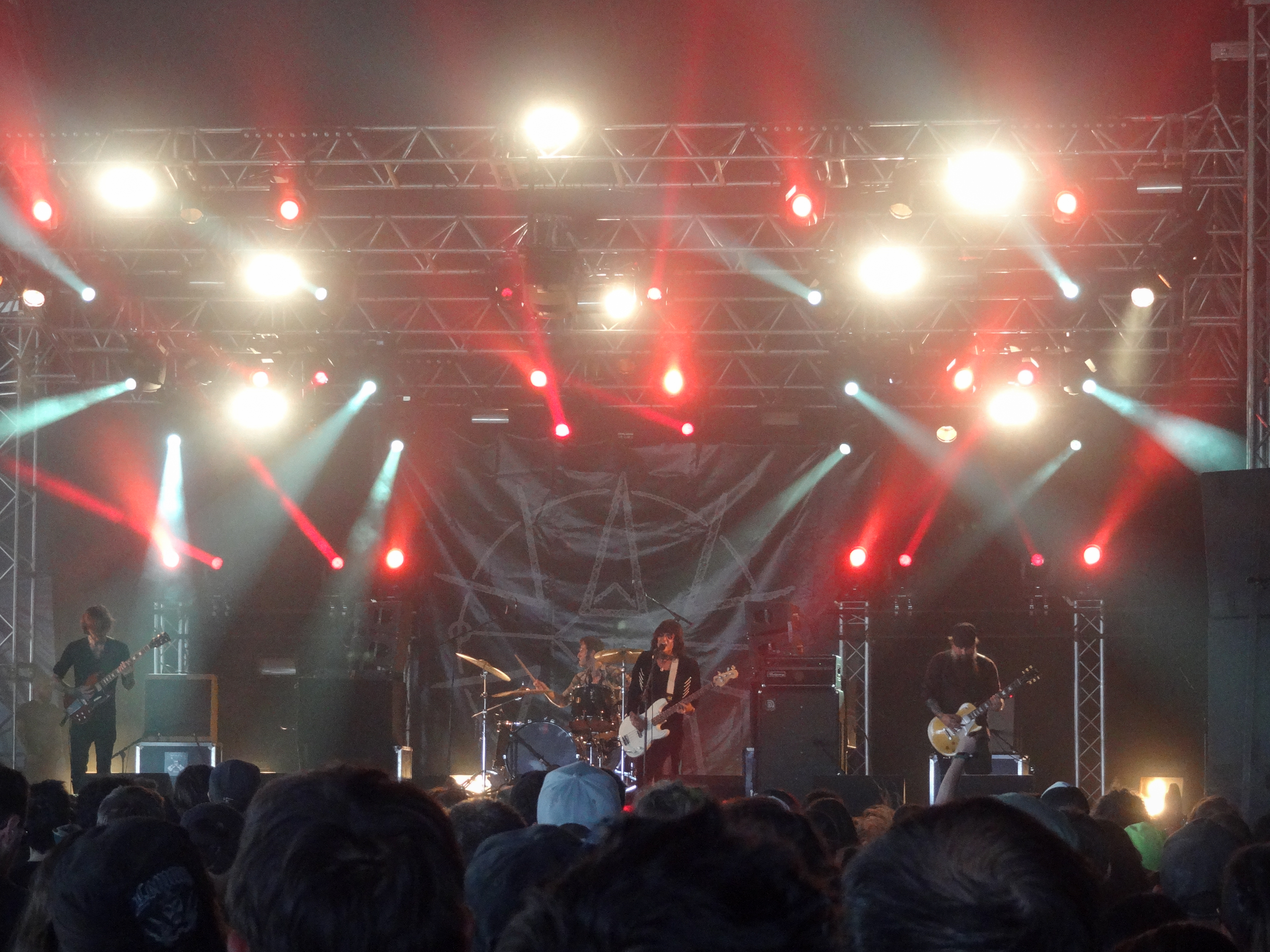 Hellfest 2014